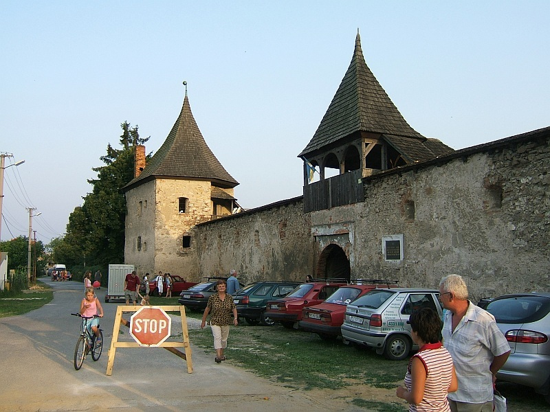 Divin - NE tower